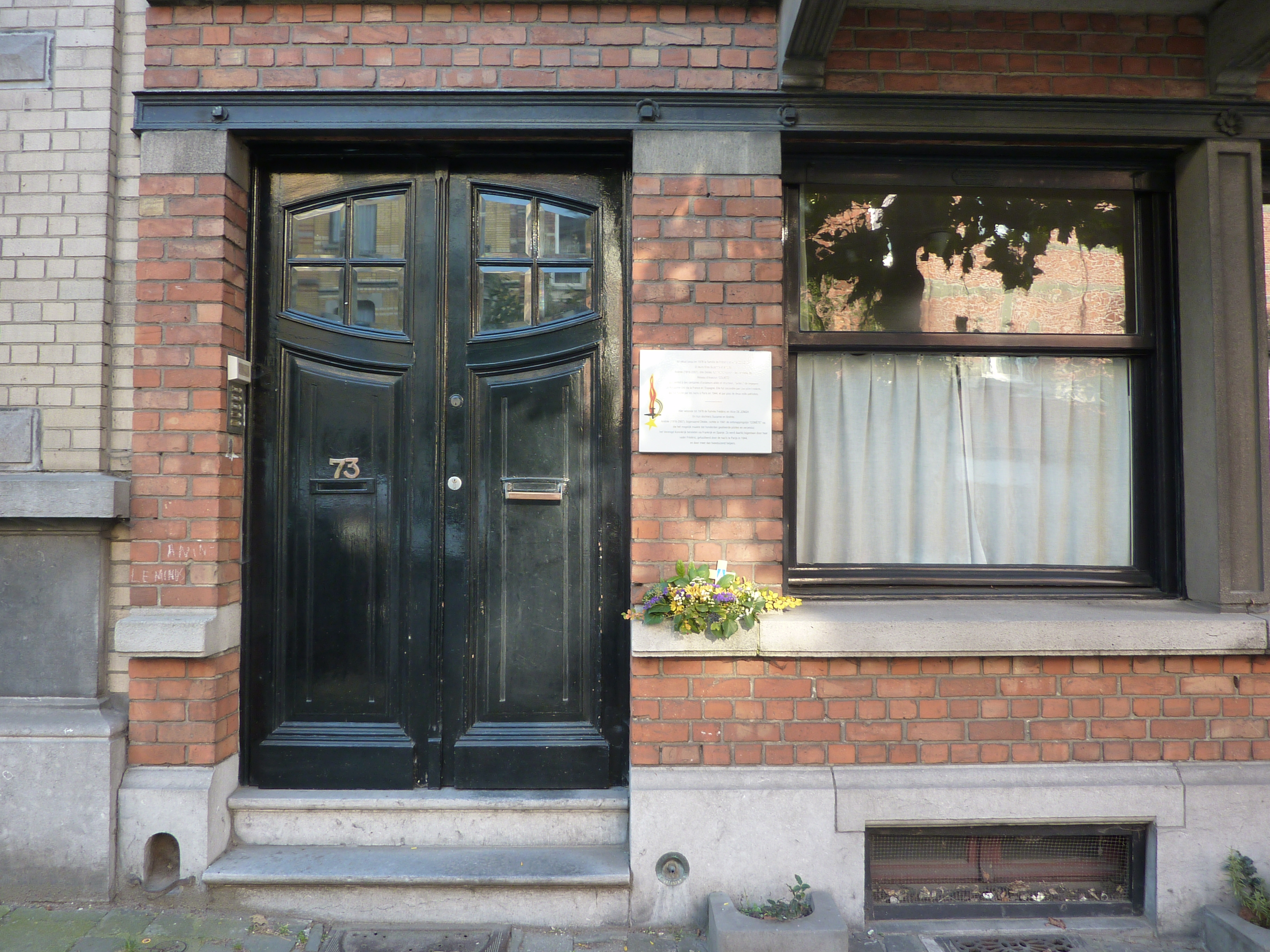 plaque commémorative Andrée De Jongh au n°73 de l'avenue Émile Verhaeren à Schaerbeek, Bruxelles, Belgique. A commemorative plaque for Andrée De Jongh at No. 73, Avenue Emile Verhaeren in Schaerbeek, Brussels, Belgium.